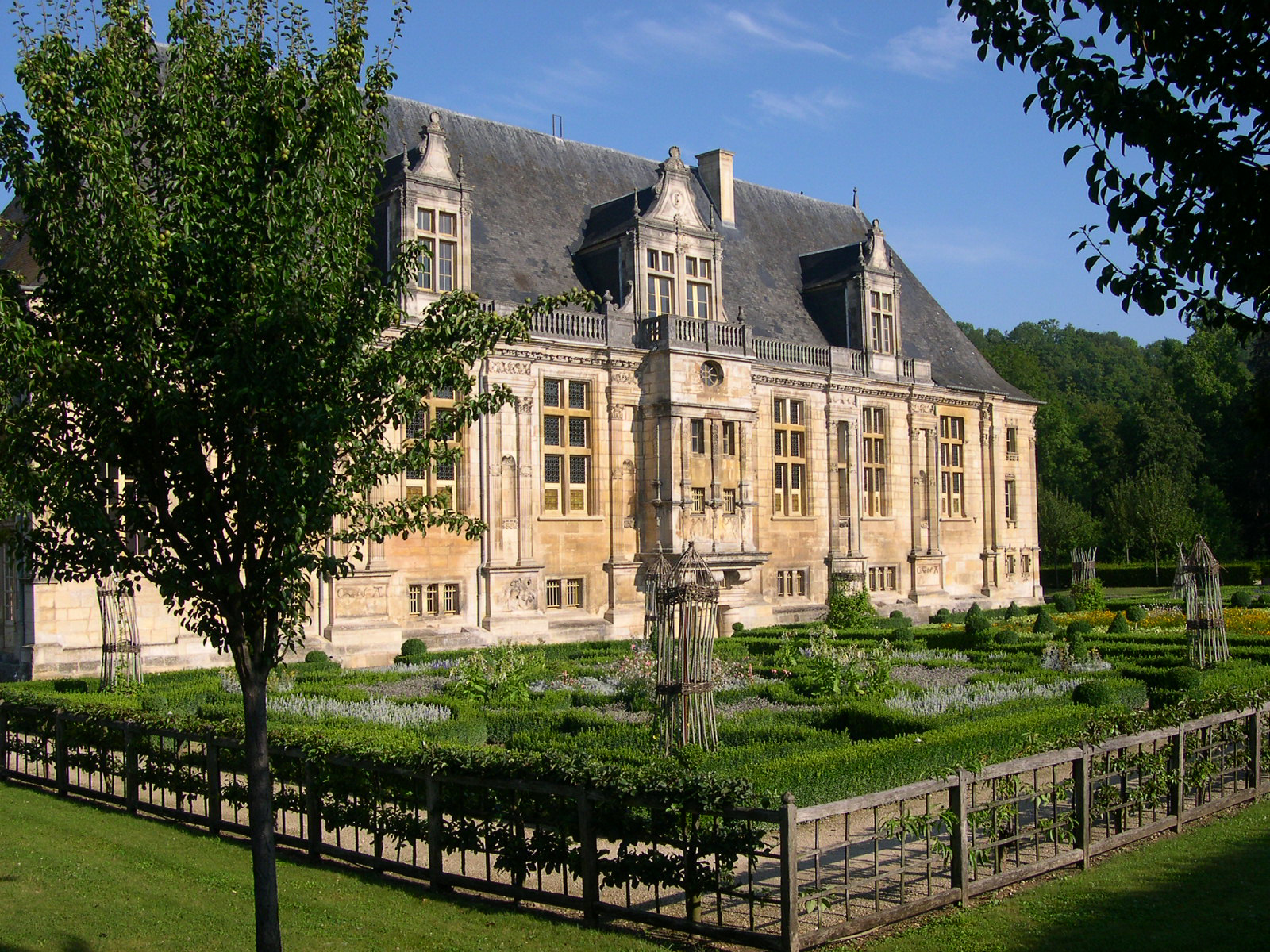 Joinville - Chateau du Grand Jardin